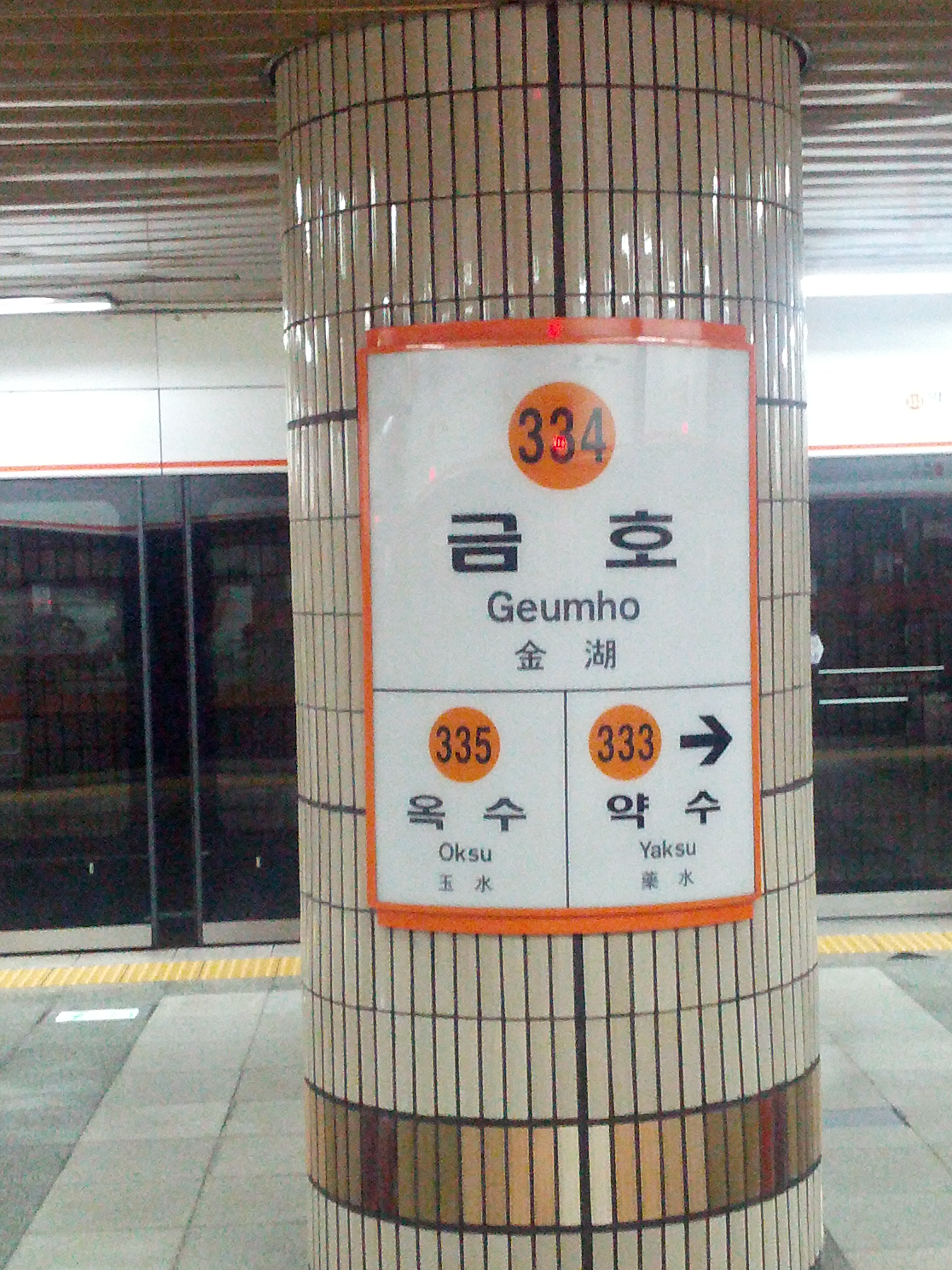 금호역 역명판